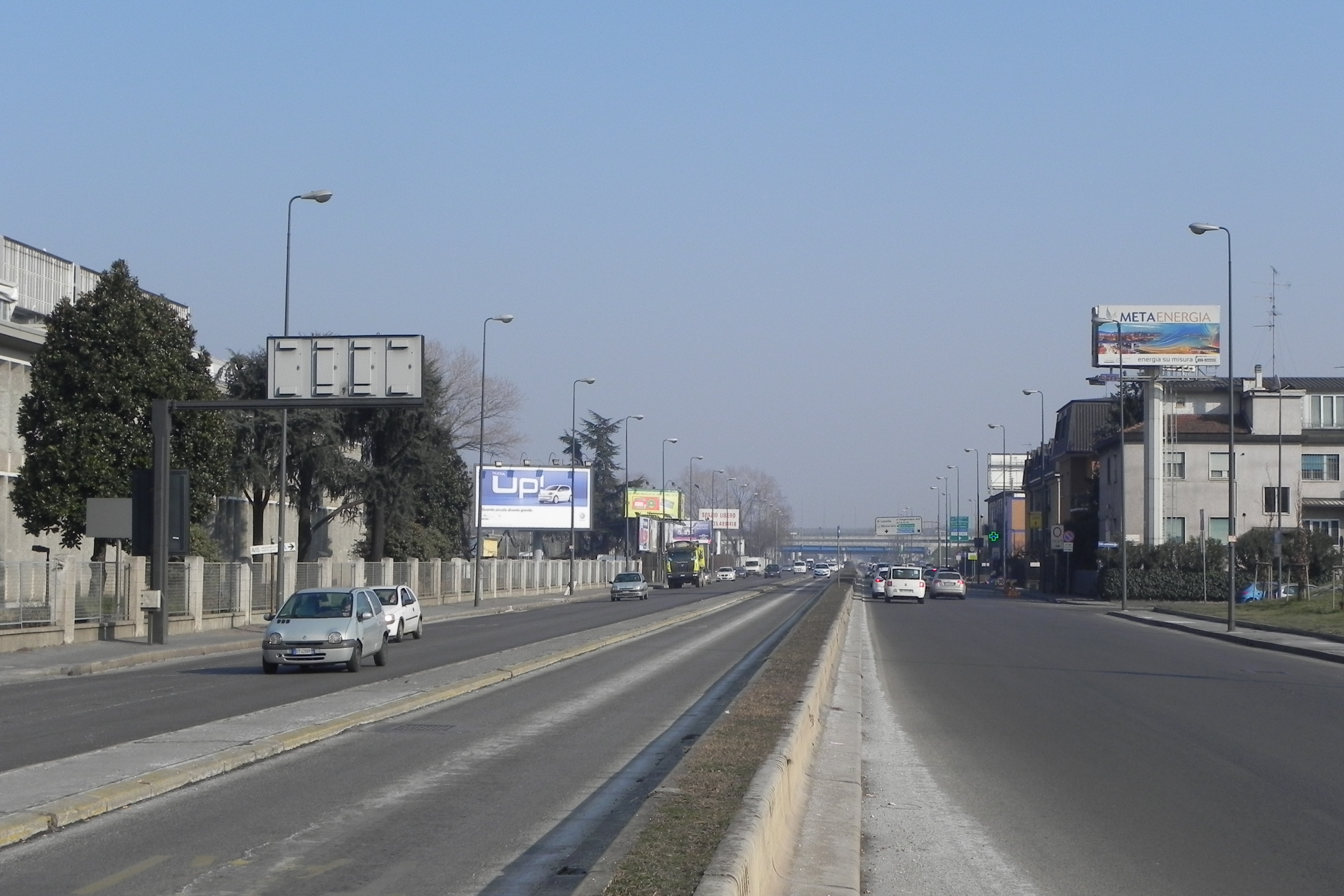 Viale Forlanini, all'altezza della via Cavriana.